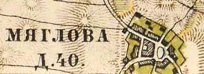 План деревни Мяглово. 1885 г.